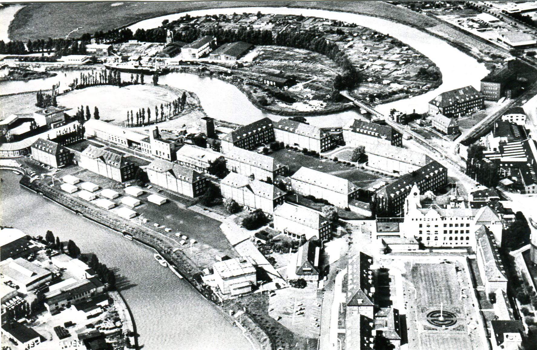 Marineschule Bremerhaven mit der Achgelisbrücke und dem Bahnanschluss der Rickmers-Werft, aufgenommen vom Gasometer an der Elbestraße. Da einige Gebäude noch von der United States Army belegt waren, wurden auf dem Schotterplatz zwischen Geeste und den Gebäuden 1–4 Baracken aufgestellt, die im Winter mit Ölöfen beheizt wurden. Links vom Sportplatz sind neben dem Hochbunker noch der Filmsaal und eine Liegenschaft der Standortverwaltung zu erkennen.